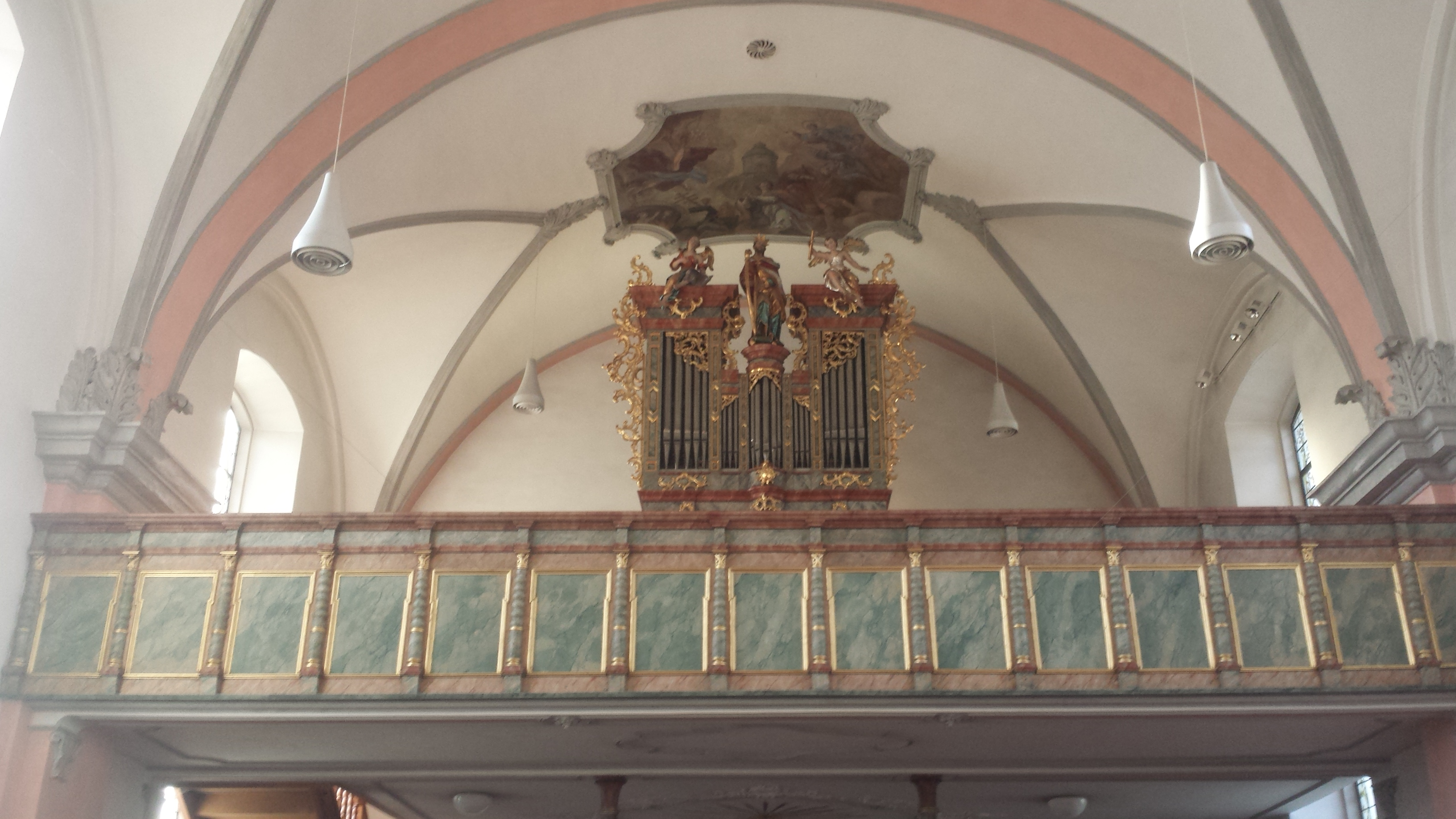 Die Orgel der St. Stephanskirche in Thüringen (Vorarlberg)